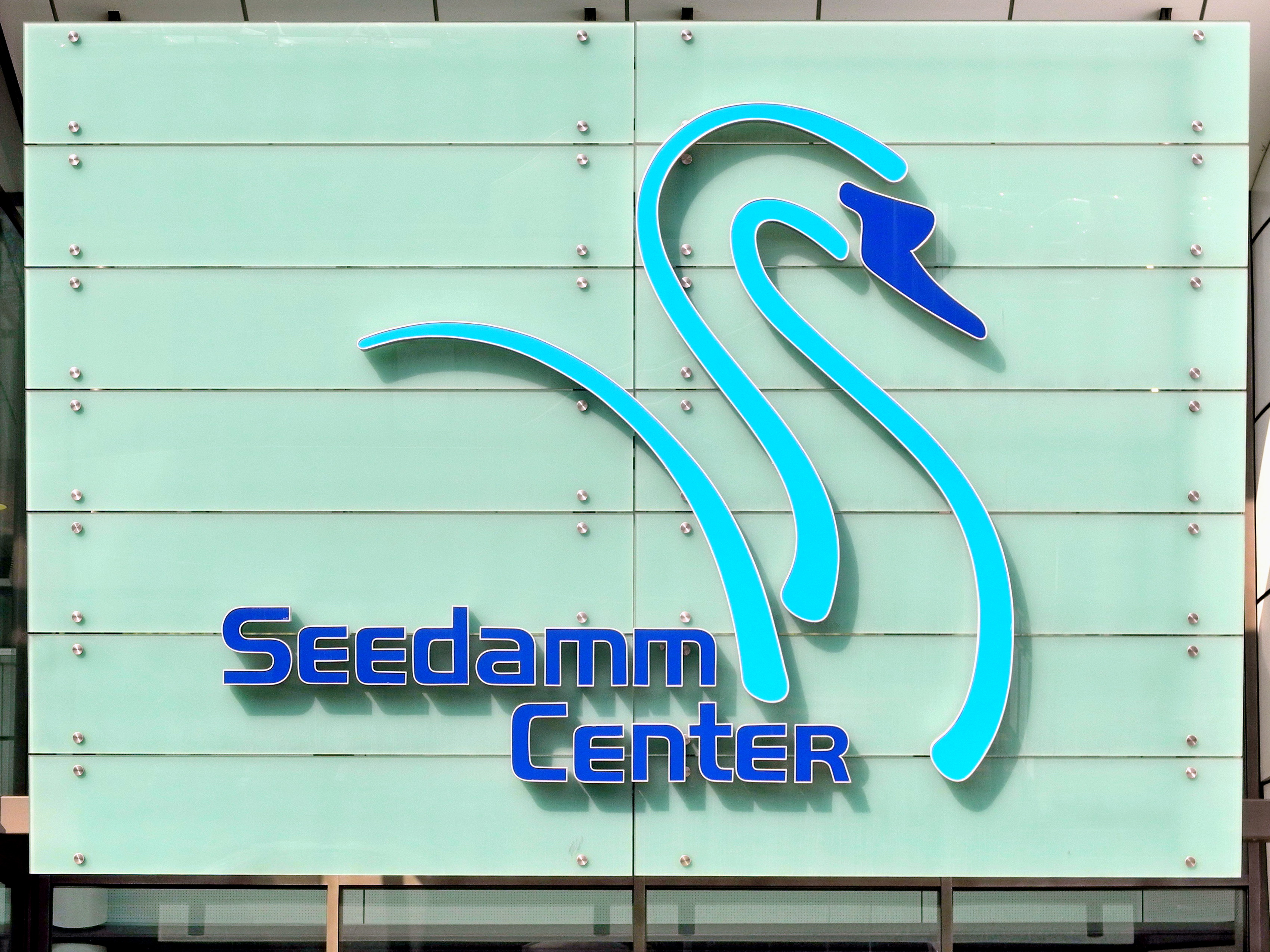 Seedamm-Center in Pfäffikon SZ (Switzerland)